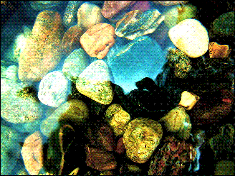 Средне и хорошо окатанная преимущественно угловатая галька уплощенной формы пёстрого петрографического состава из береговой полосы Телецкого озера. Алтай. Июль 2010 года. Фото А. Н. Рудого